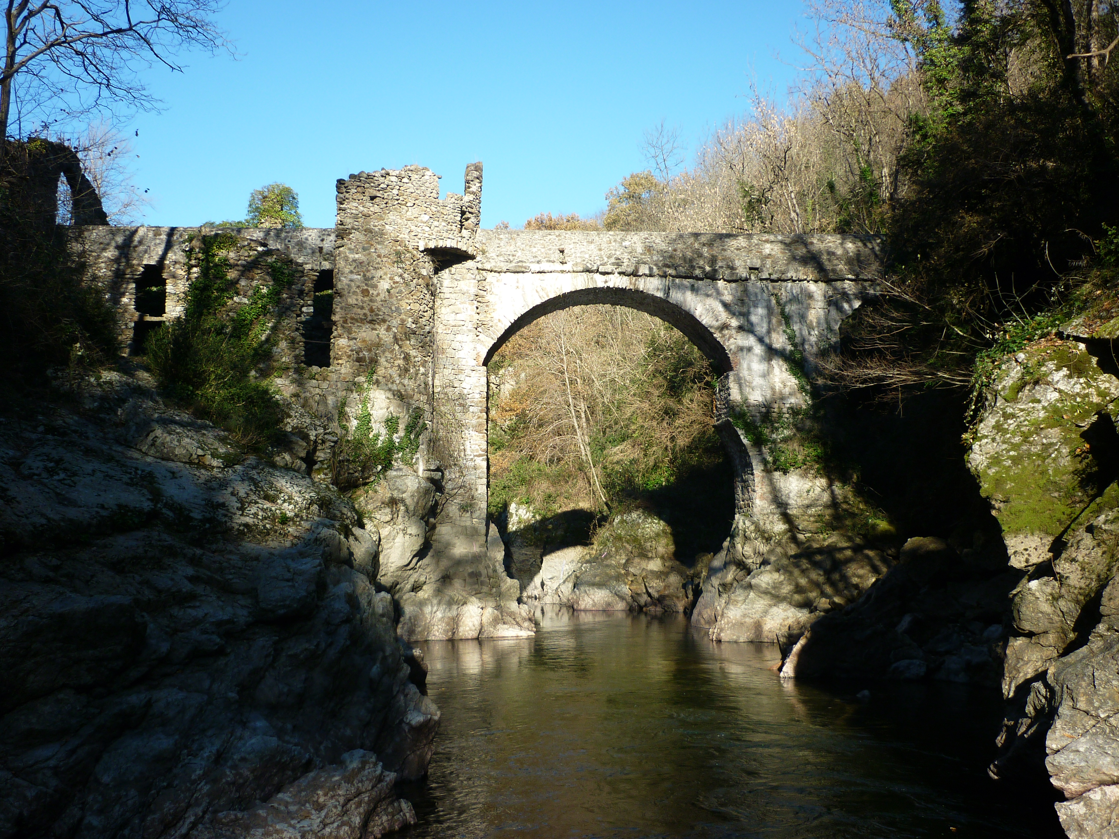 Vue générale du pont du diable à Mercus-Garrabet (Ariège)